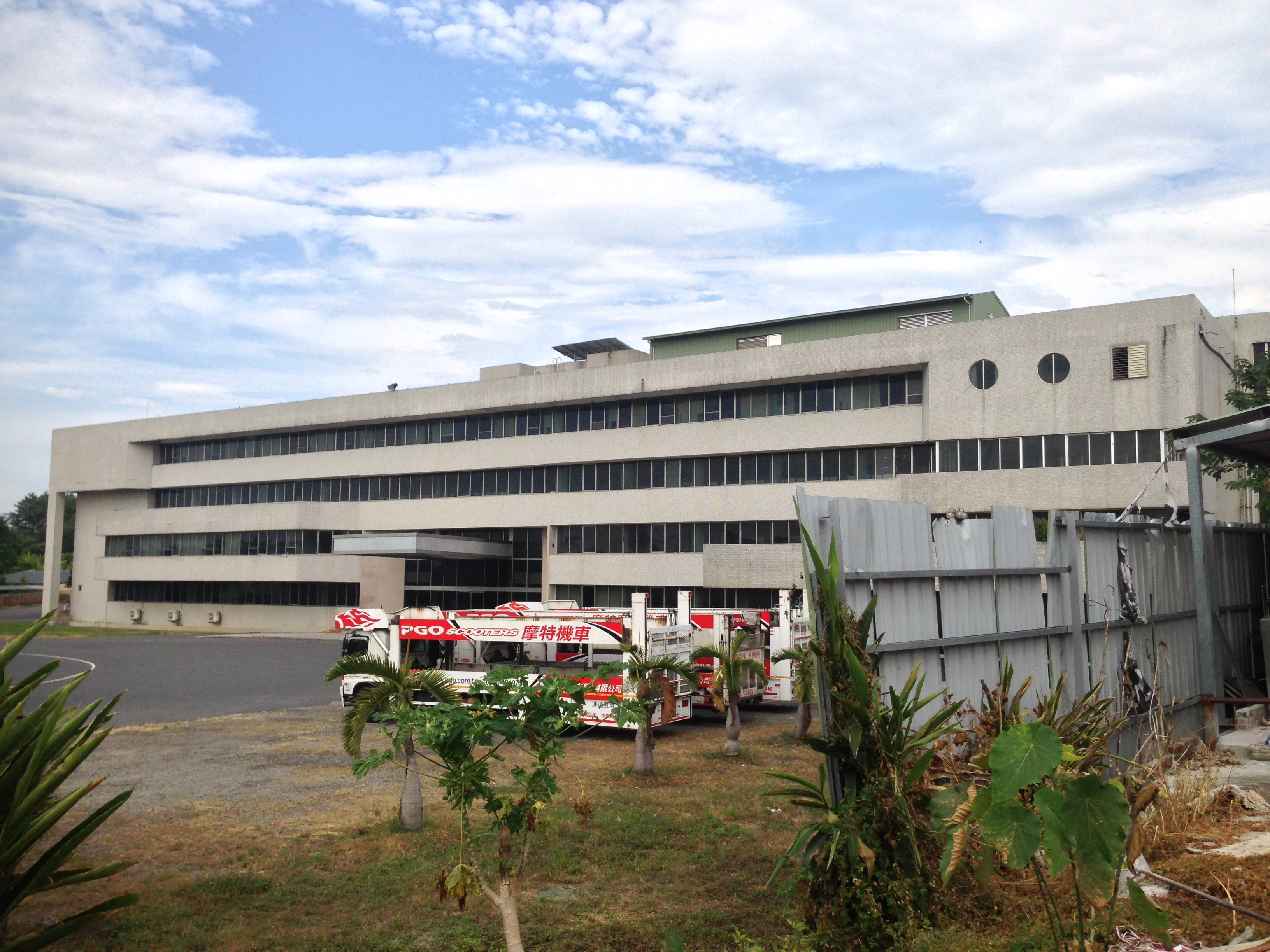 中文（台灣）: 摩特動力工業